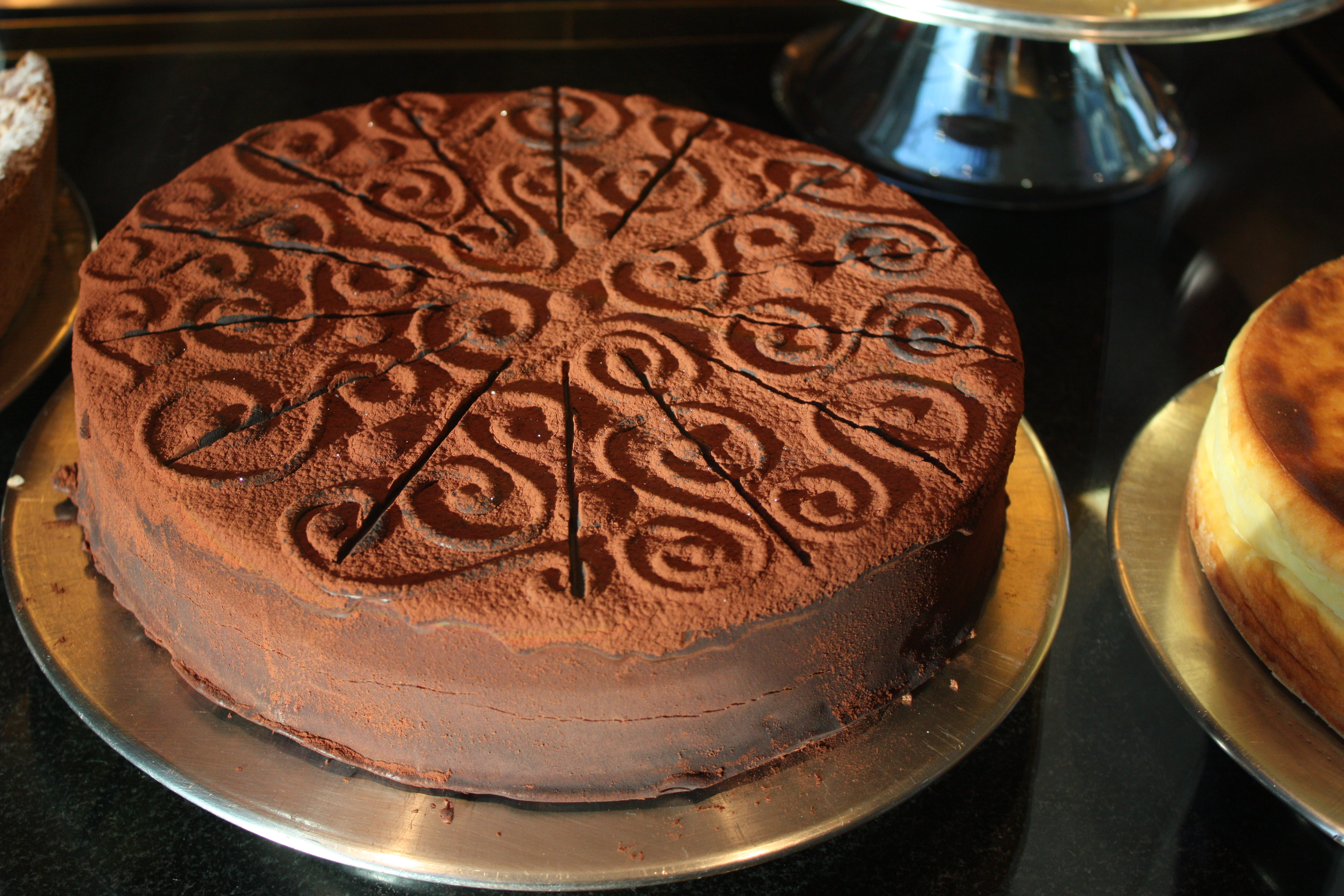 Köln, März 2009; Schokoladentorte im Schokoladenmuseum Köln